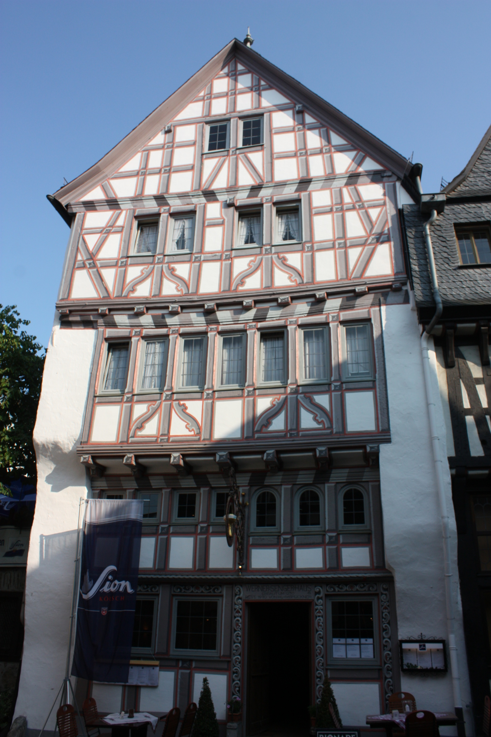 Limburg (Altstadt), Hessen: Das sog. Werner-Senger-Haus